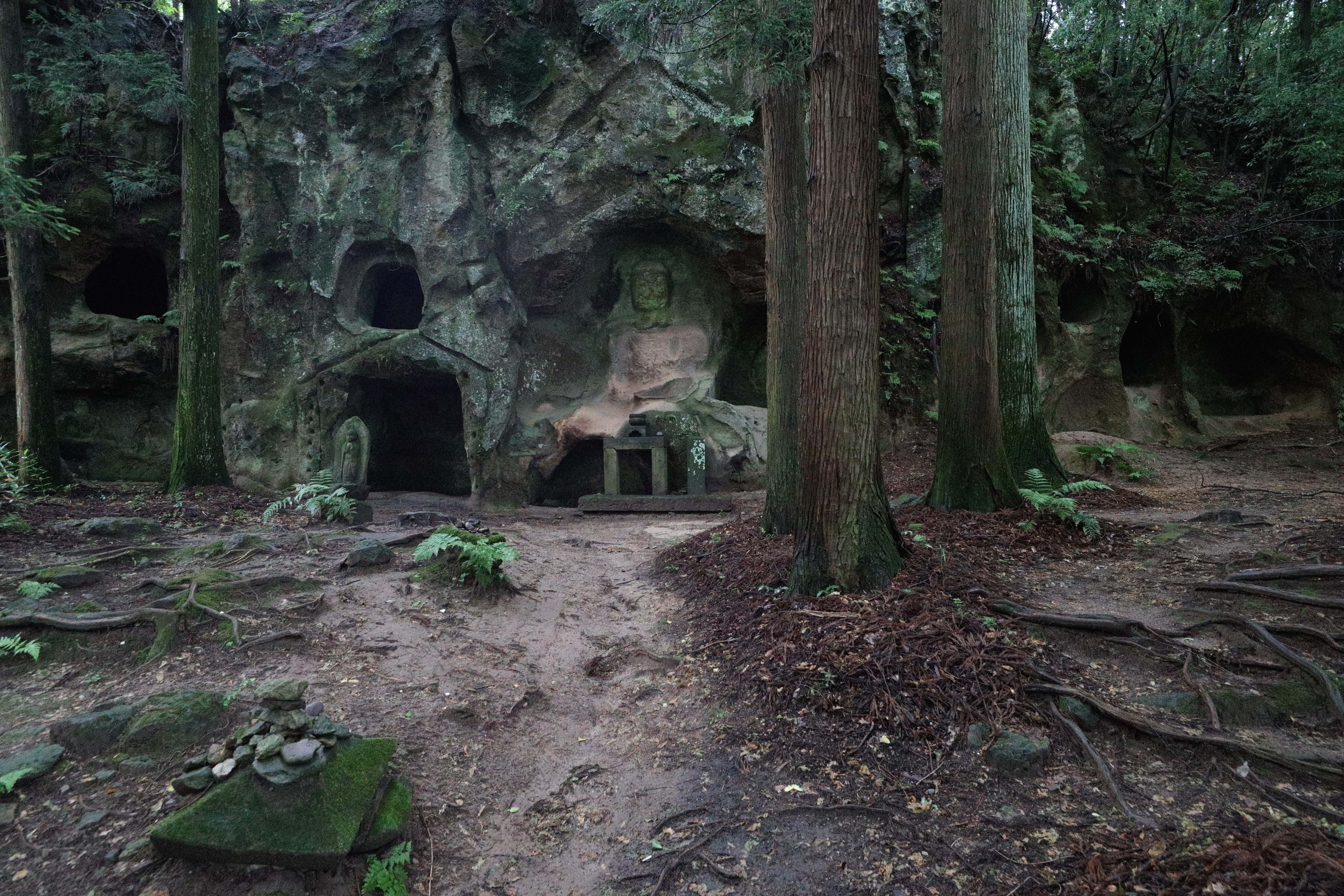 福島県須賀川市和田字大仏にある和田大仏及び横穴墓群